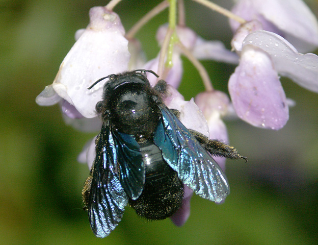 Femelle d'abeille charpentière (Xylocopa valga), butinant une glycine (Wisteria chinensis) à Lyon.